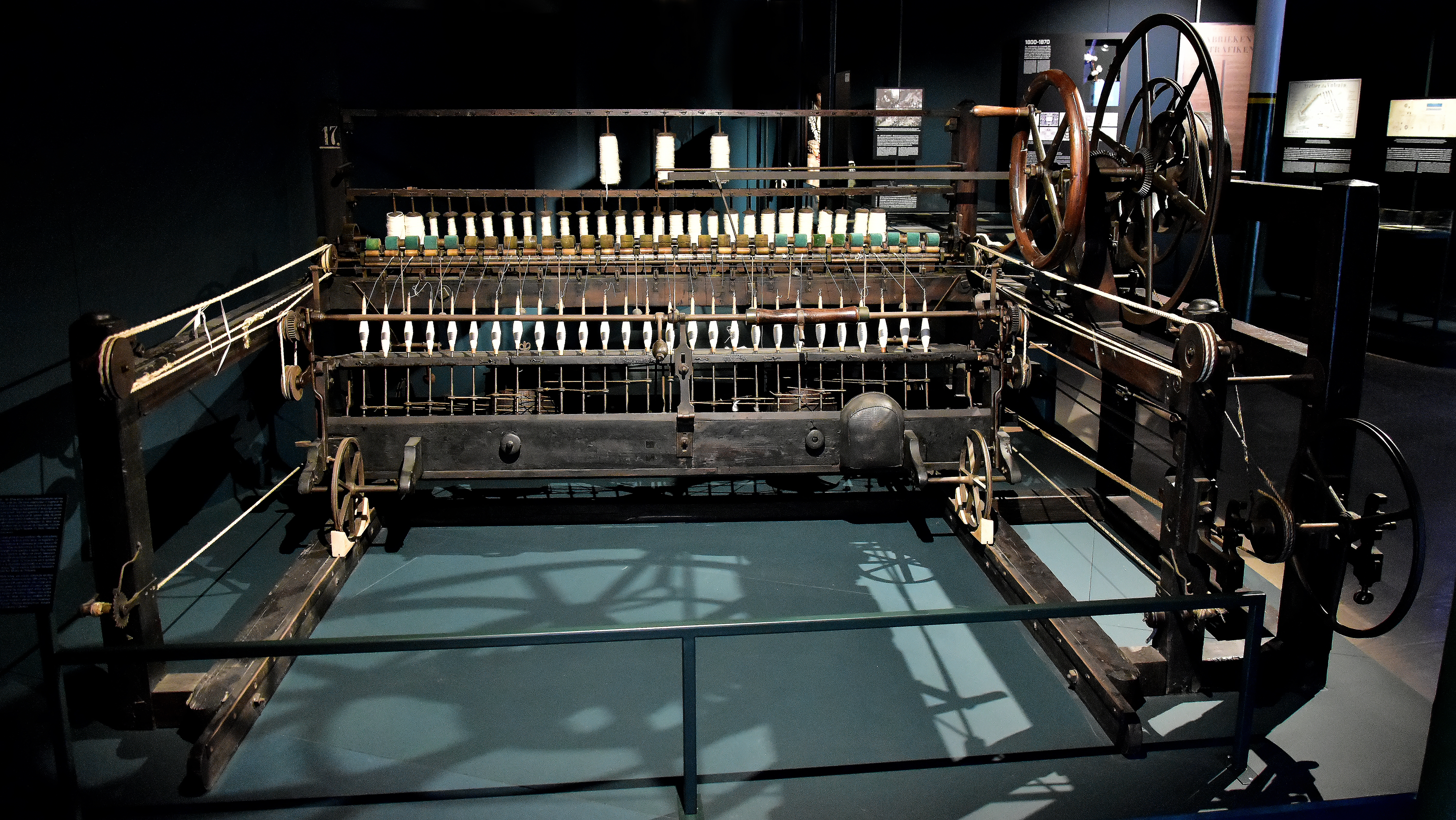 Mule Jenny Industriemuseum Gent 18-11-2019 13-49-24 This photo of movable heritage has been taken in the Flemish Region